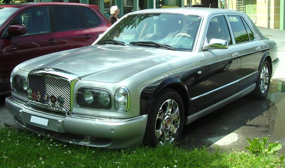 Bentley Arnage Red Label in "freier Wildbahn" (Maria Wörth, Wörthersee)